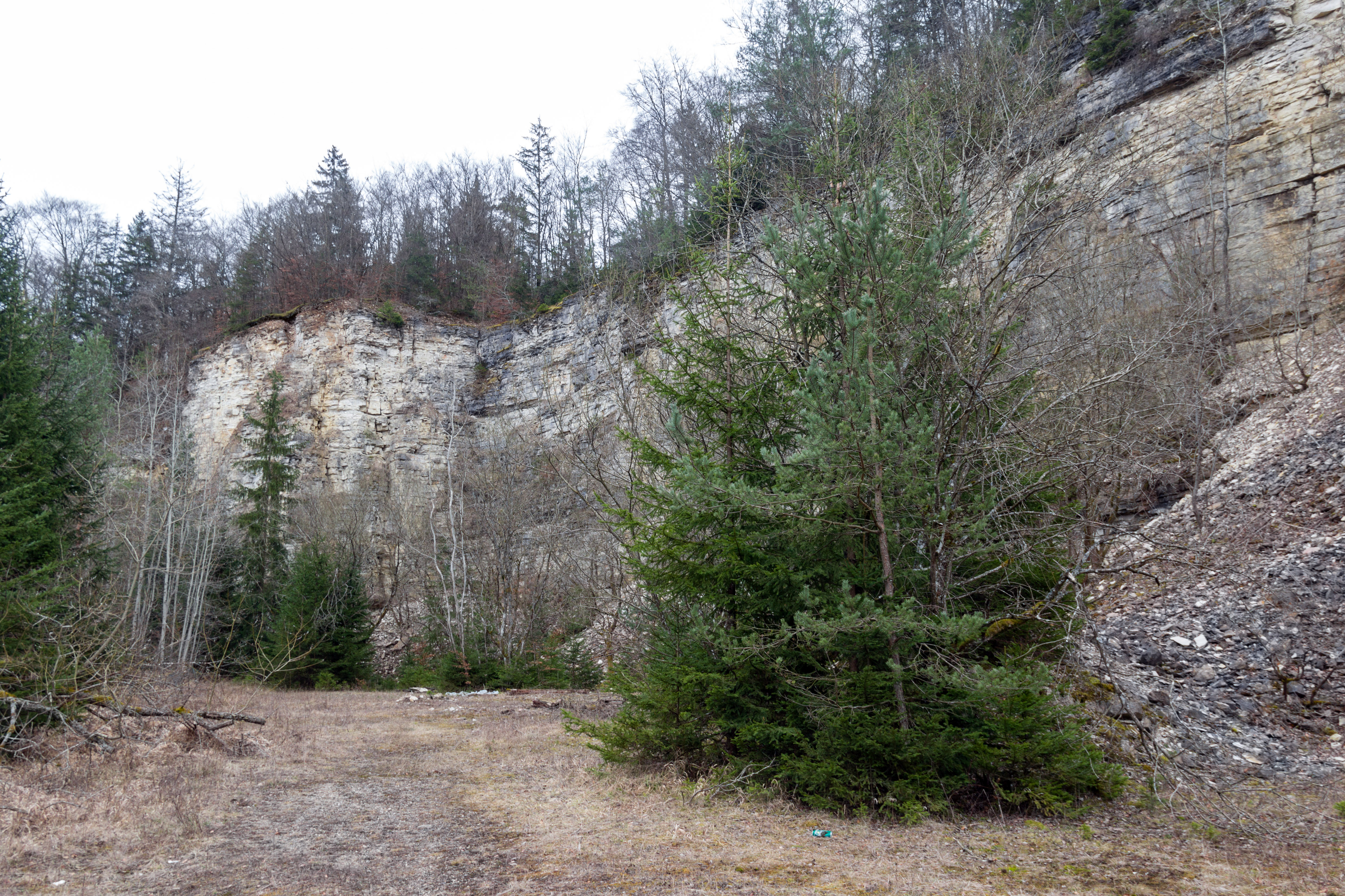 Steinbruch Greding, Geotop 576A003